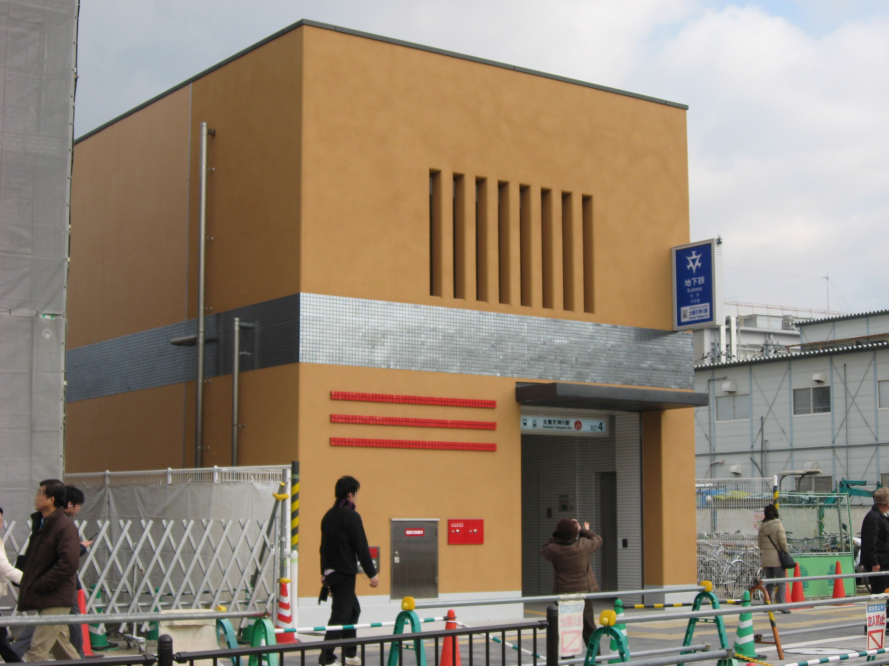 Uzumasa Tenjingawa Station (No.4 Exit)